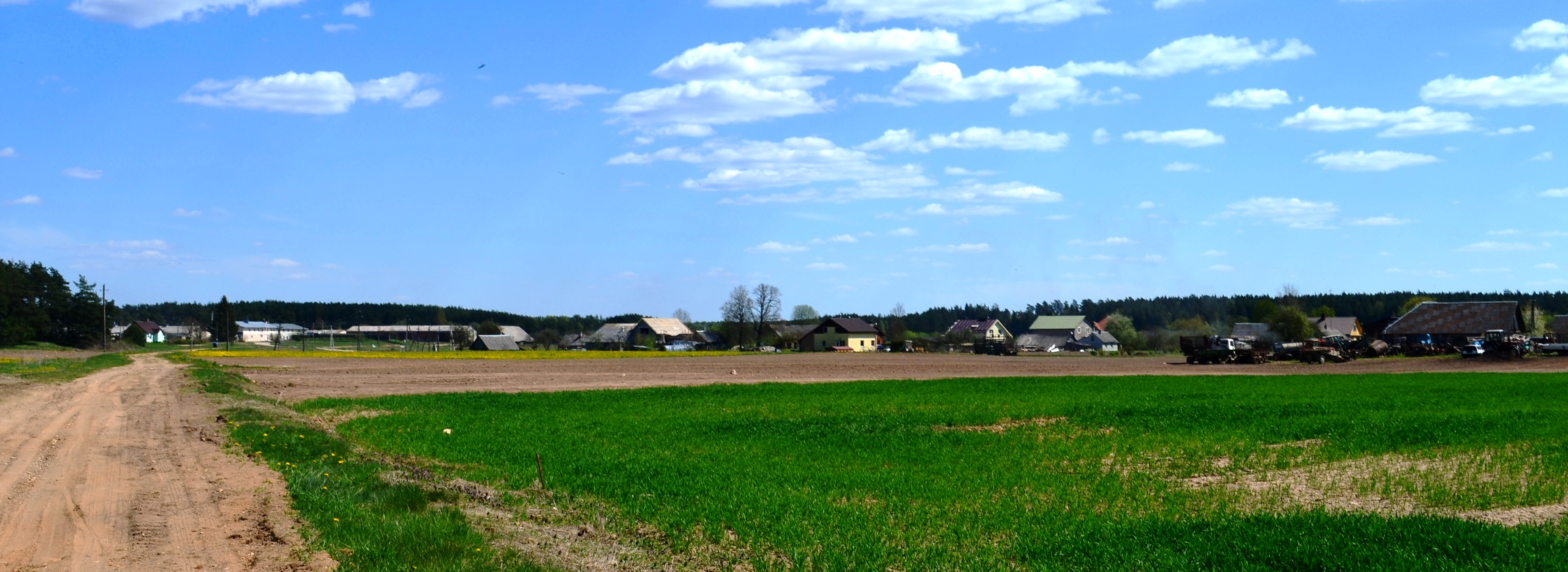 Pašiliai, Riešės sen., Vilniaus raj.